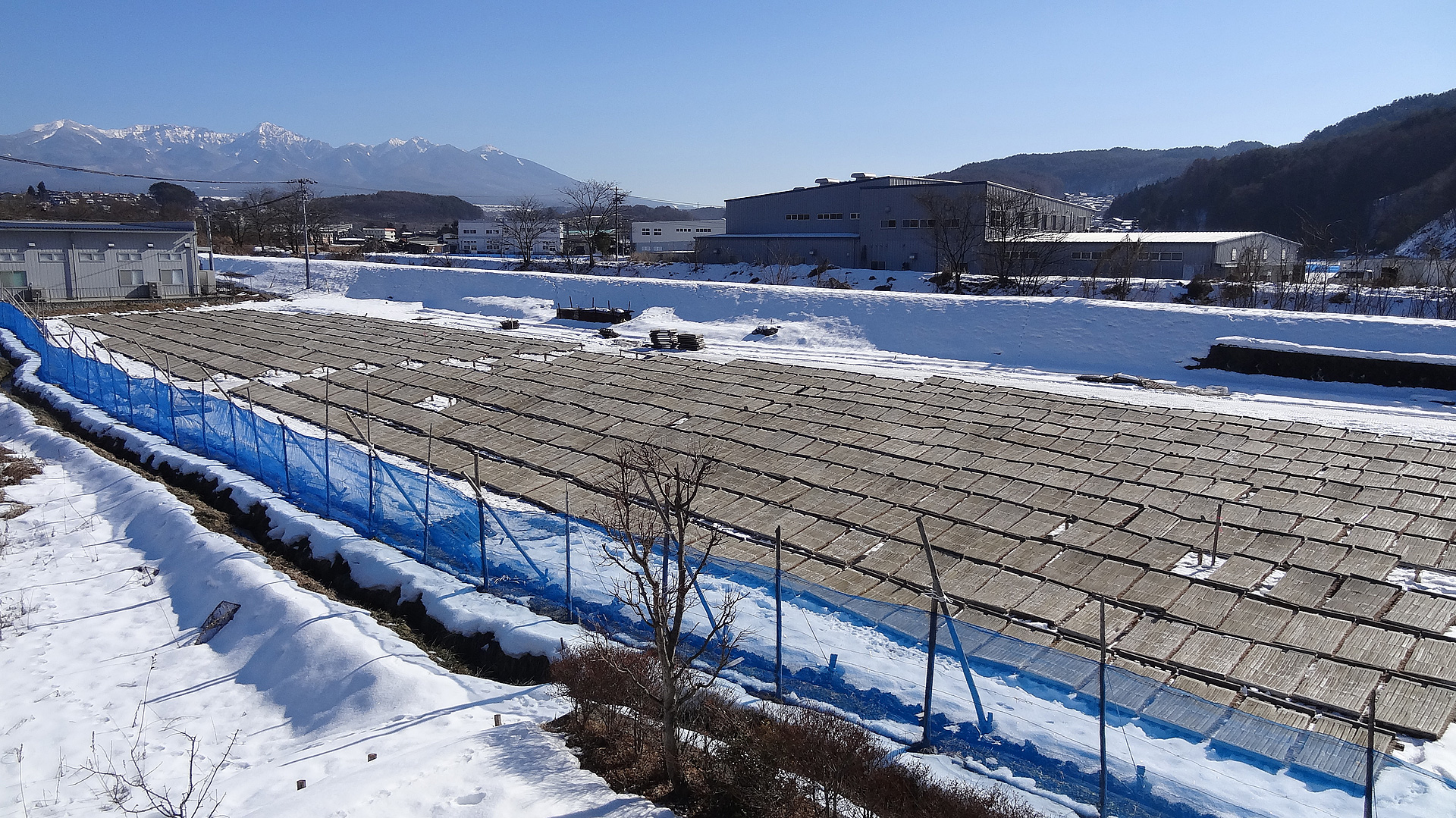 八ヶ岳と天然寒天干し